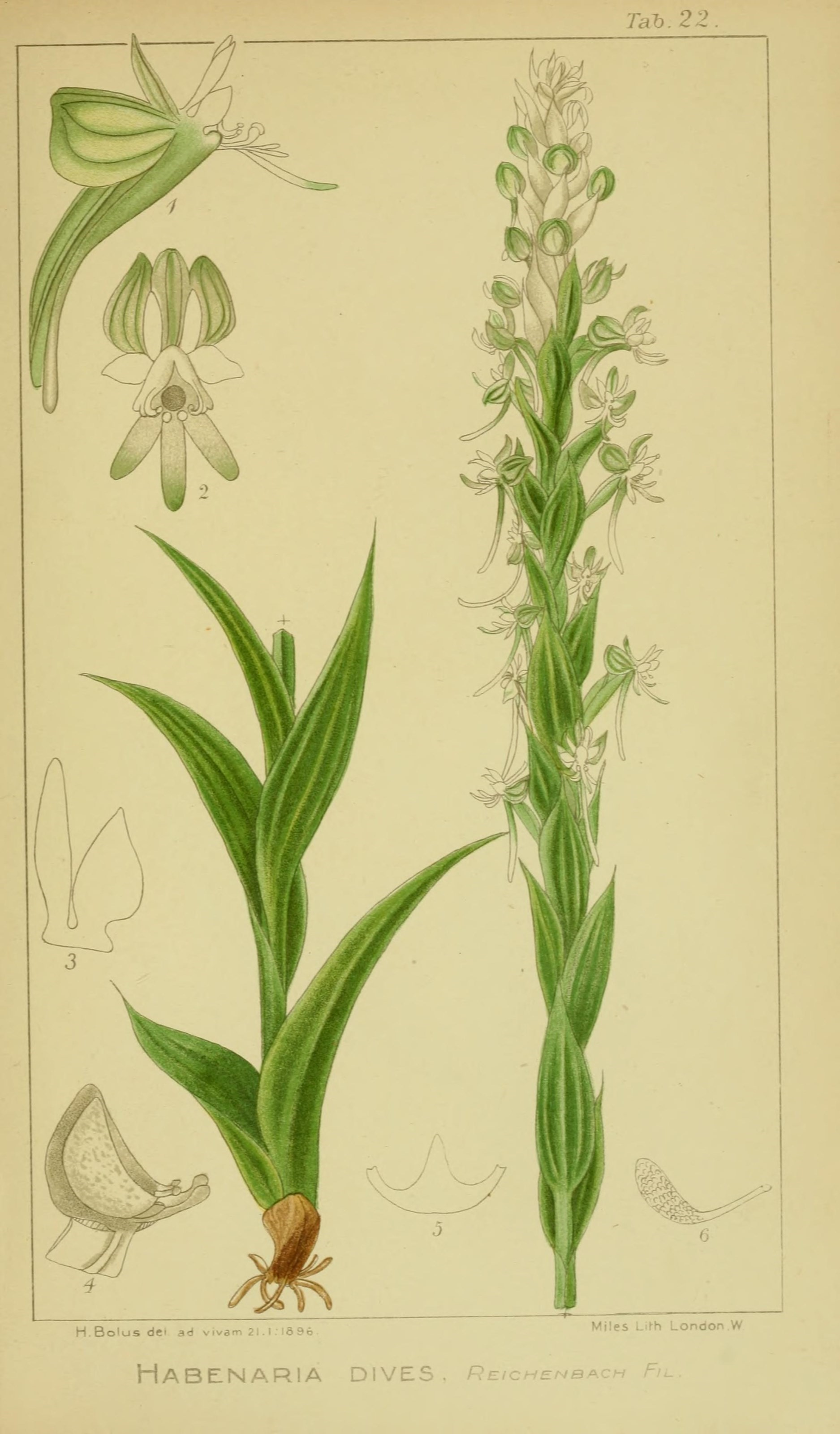 TalD.22. H Bolos dei ad vivam 21.1 I69t Miles Lifh London W HaBENARIA dives. Reicheinbp